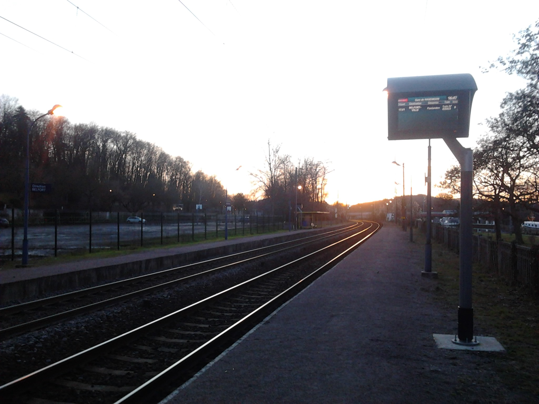 La gare du Hasenrain à Mulhouse, le 31 décembre 2012.